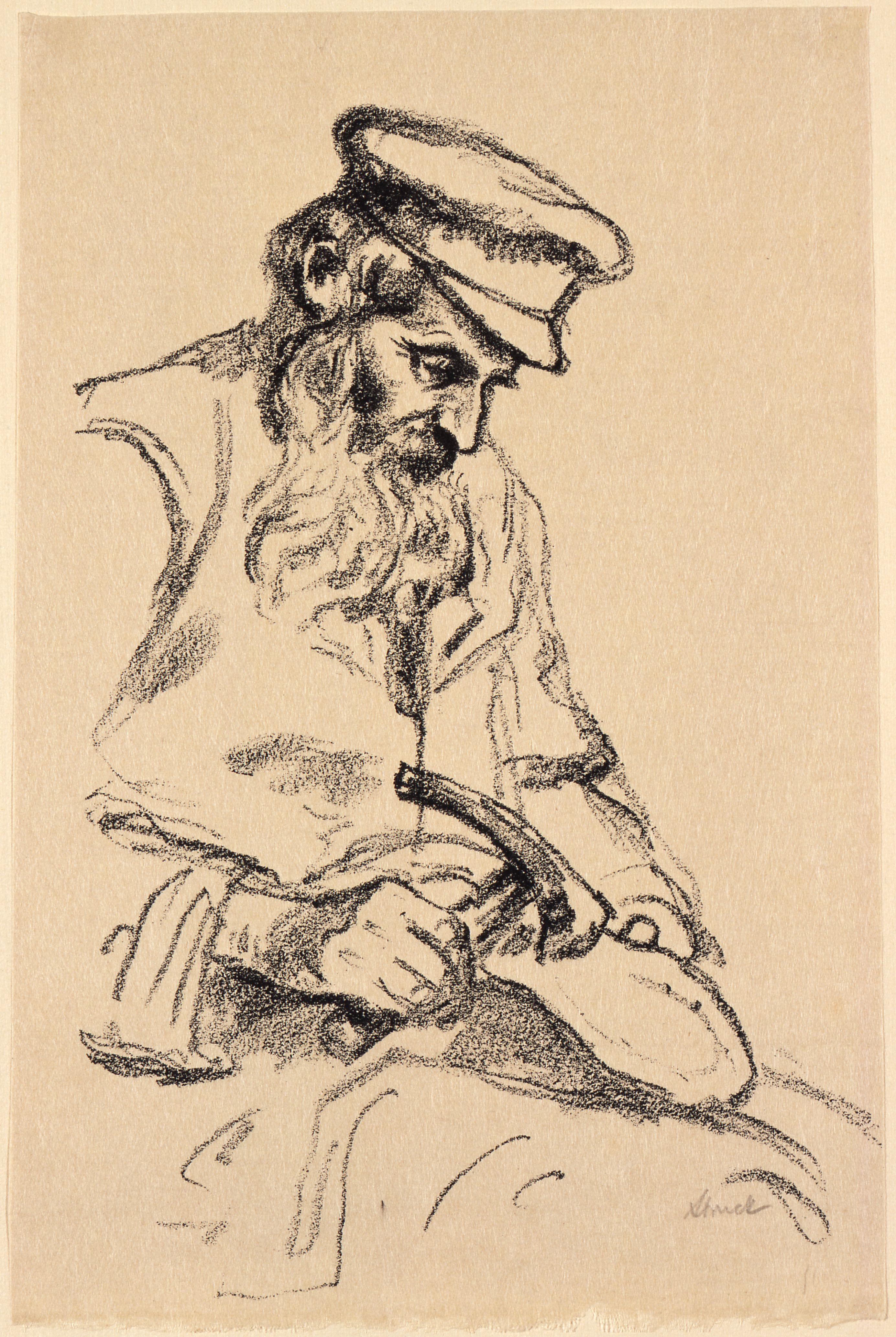 Artwork by Hermann StruckDargestellte Person: Oberbefehlshaber Ost, DNB-LinkDatierung Display: ca. 1916Bezug: Aus der Mappe "Skizzen aus Russland. Ostjuden"Objektart: LithografieSchlagworte Inhalt /Geografie: Berlin, Ostjuden, Ostjude (Darstellungstradition), Kaunas, Mann, Porträt, Arbeit, Hammer, Schuh, Schuhmacher, KopfbedeckungSchlagworte Kontext: Weltkrieg (1914-1918), Jüdische Renaissance, Wehrdienst